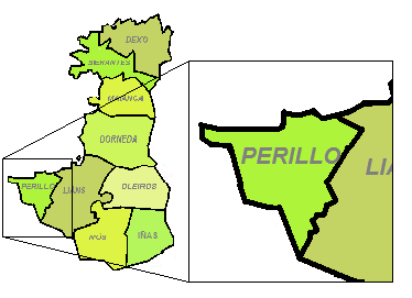 Perillo.